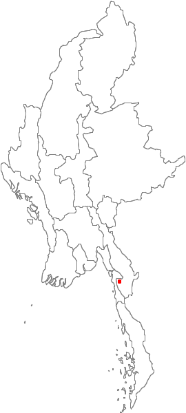 Tagondaing in Birmania